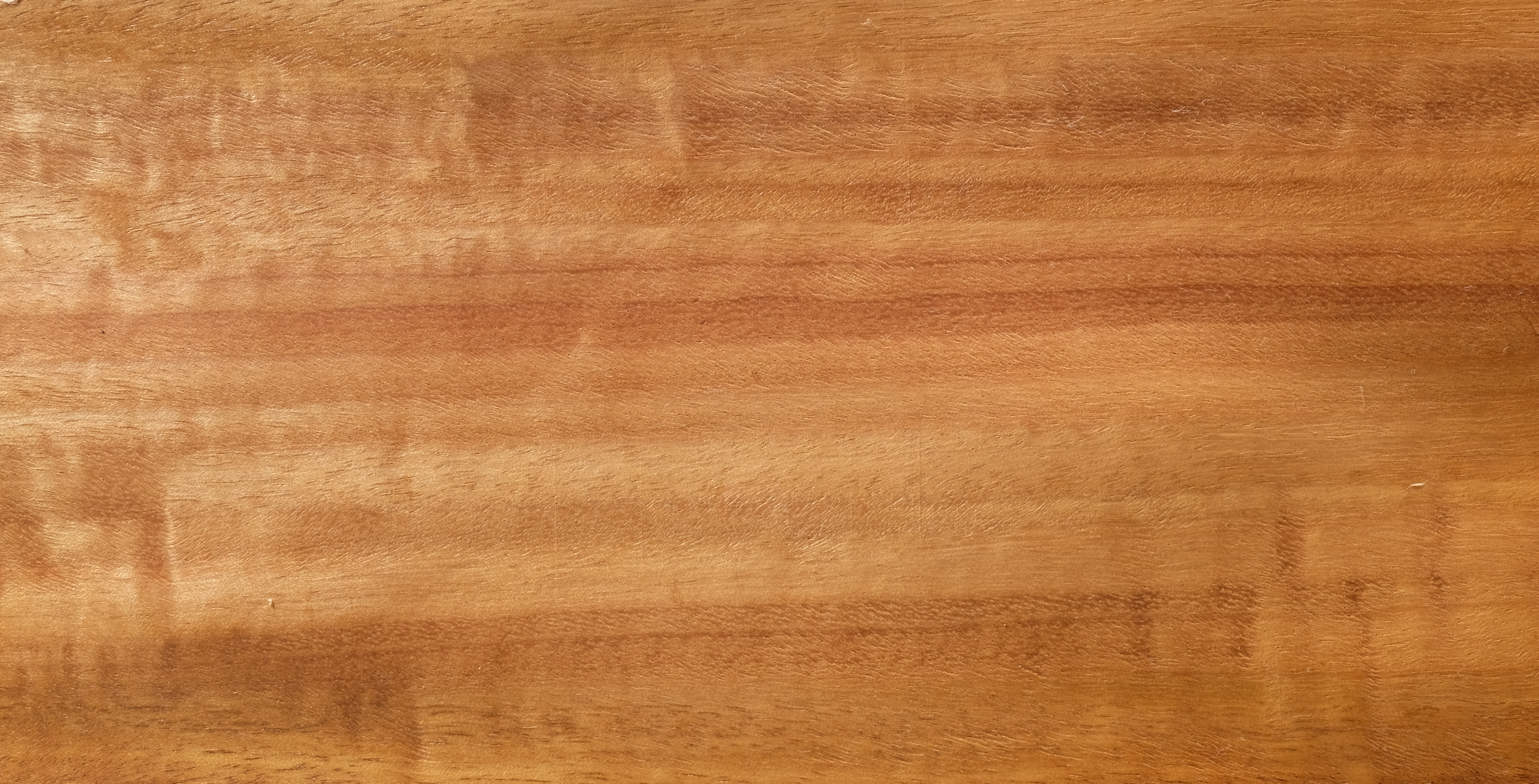 gemessertes Furnier; Holzart: Eucalyptus, Globulus, Blue Gum